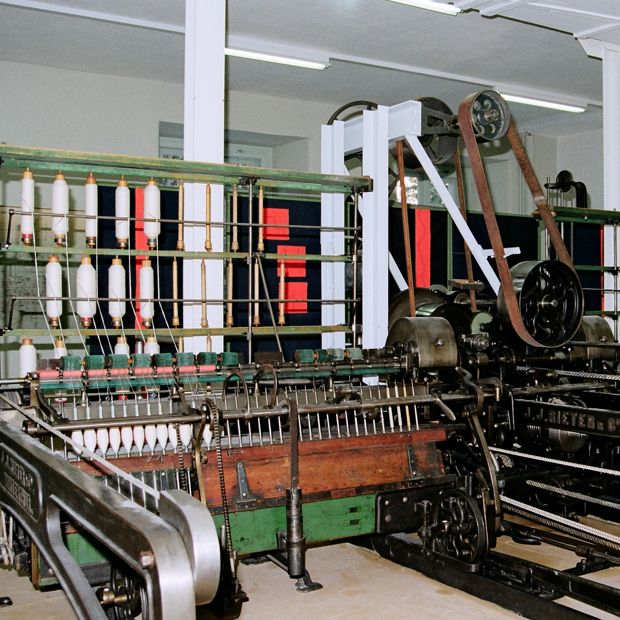 Spinnmaschine Selfaktor von der Firma J.J. Rieter, Winterthur, erbaut 1889, ausgestellt in der Museumsspinnerei Neuthal, Bäretswil, Schweiz.